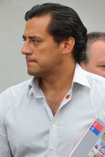 Francisca Ayala, Hotuiti Teao, Cecilia Pérez.